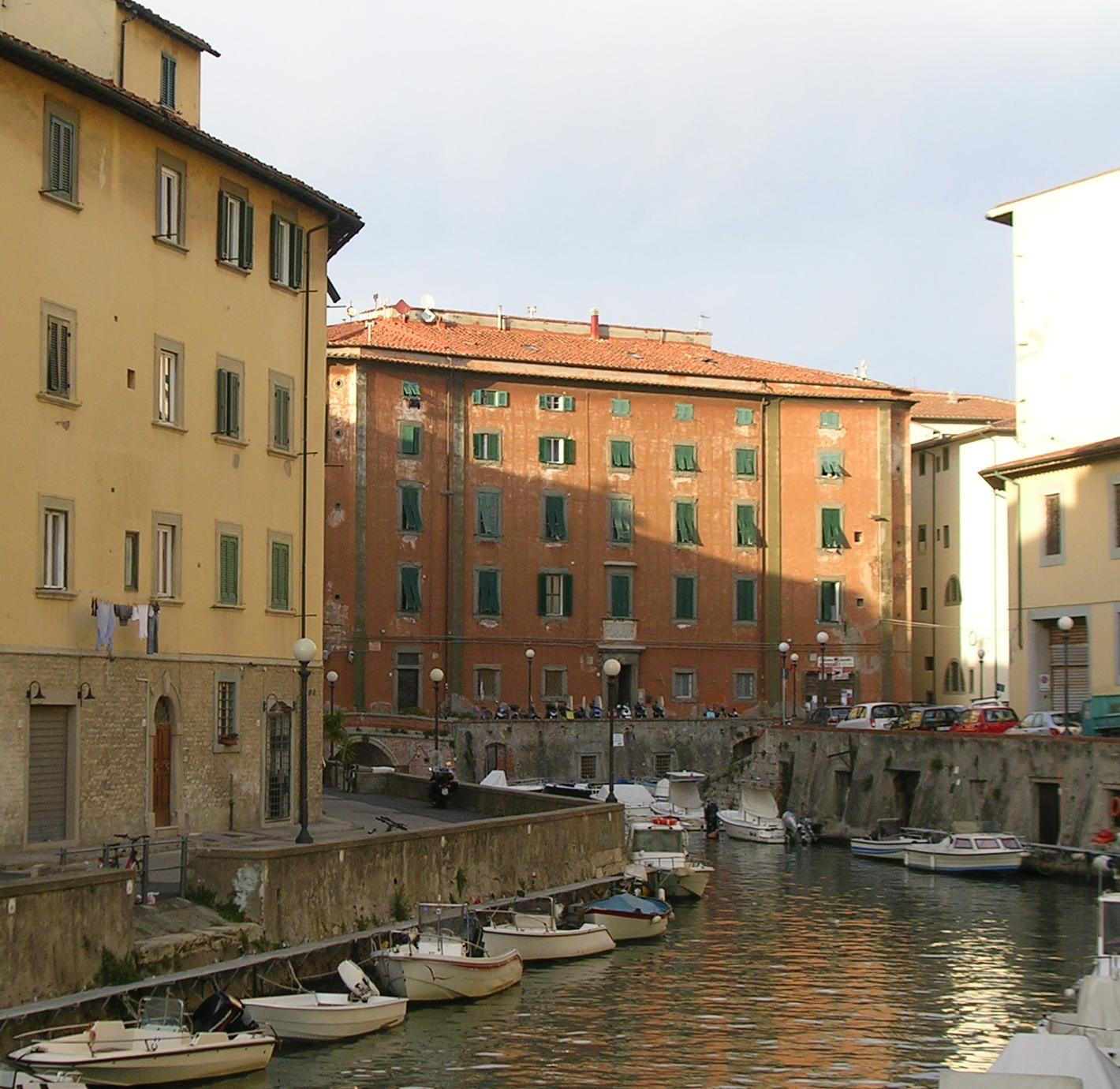 Livorno: il Palazzo del Refugio risalente al XVIII secolo.